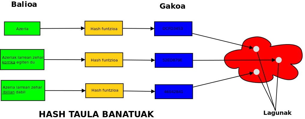 Hash taula banatuetan oinarritutako P2P sistema